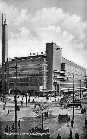 De Bijenkorf in Rotterdam. Foto van prentbriefkaart uit 1935, fotograaf onbekend BIJenkorf department store, Rotterdam, 1935